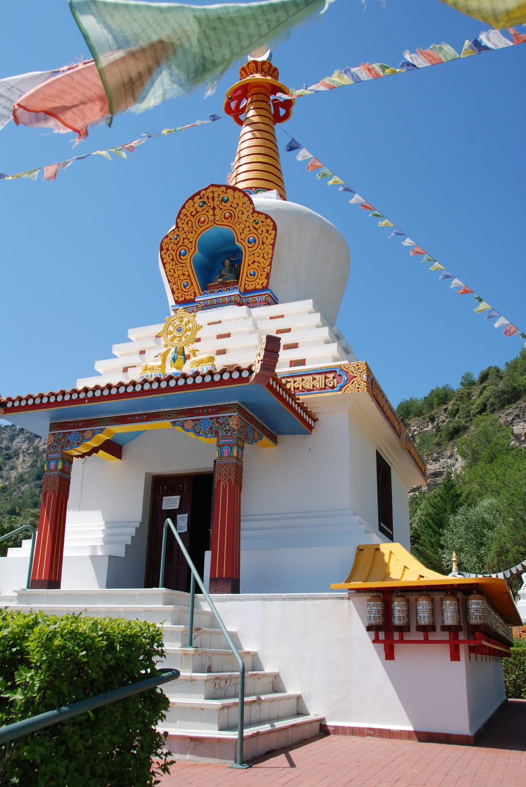 Templo budista de Panillo. Dentro de la Estupa (que así se llama el edificio) se puede sentar uno a meditar.